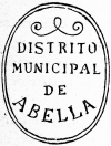 Escut antic del municipi d'Abella de la Conca (Pallars Jussà)